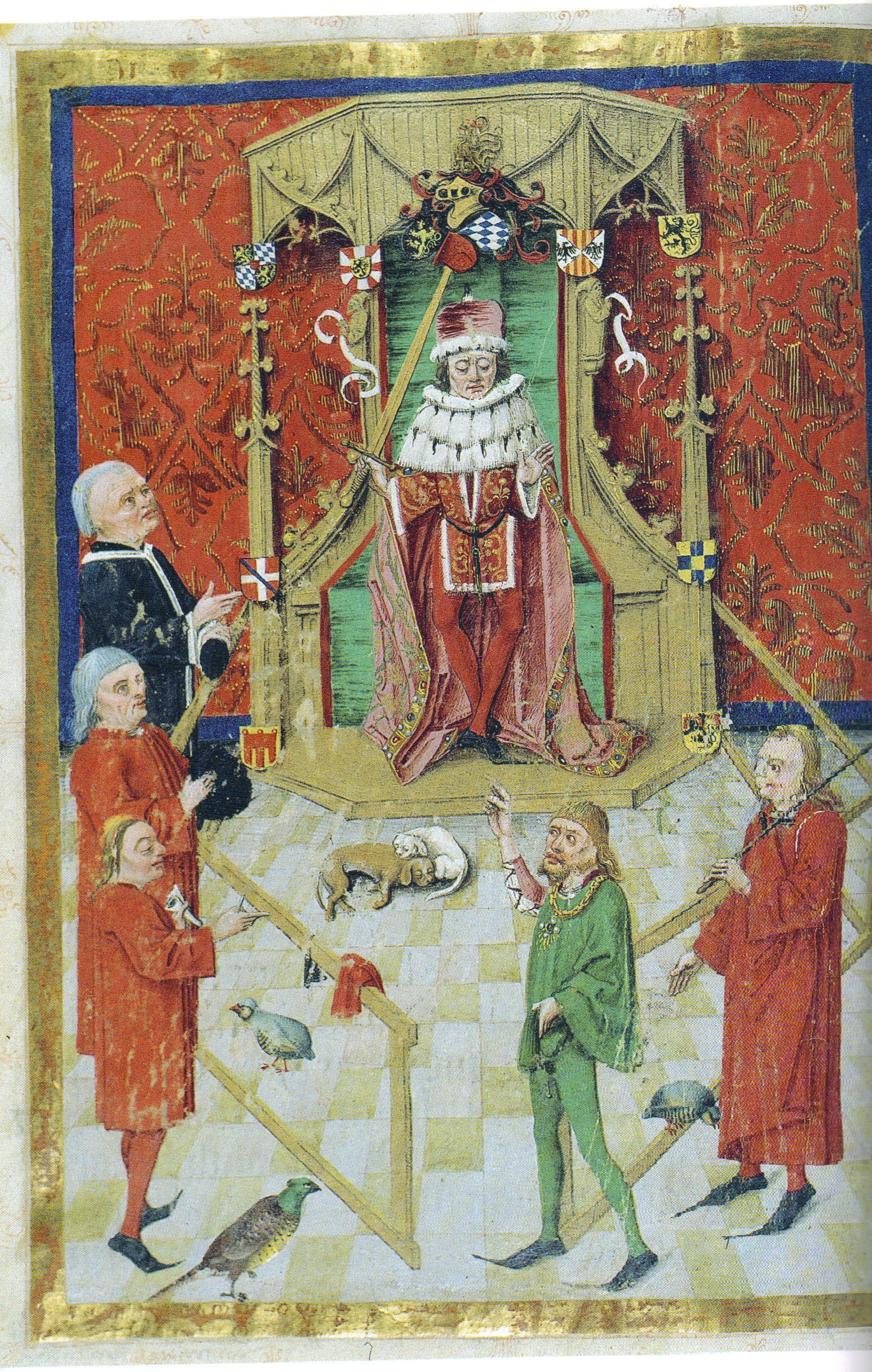 Pfalzgraf Friedrich der Siegreiche, Miniatur im Lehenbuch GLA Karlsruhe 67/1057 (links im schwarzen Talar der kurpfälzische Kanzler und Speyerer Fürstbischof Matthias von Rammung)